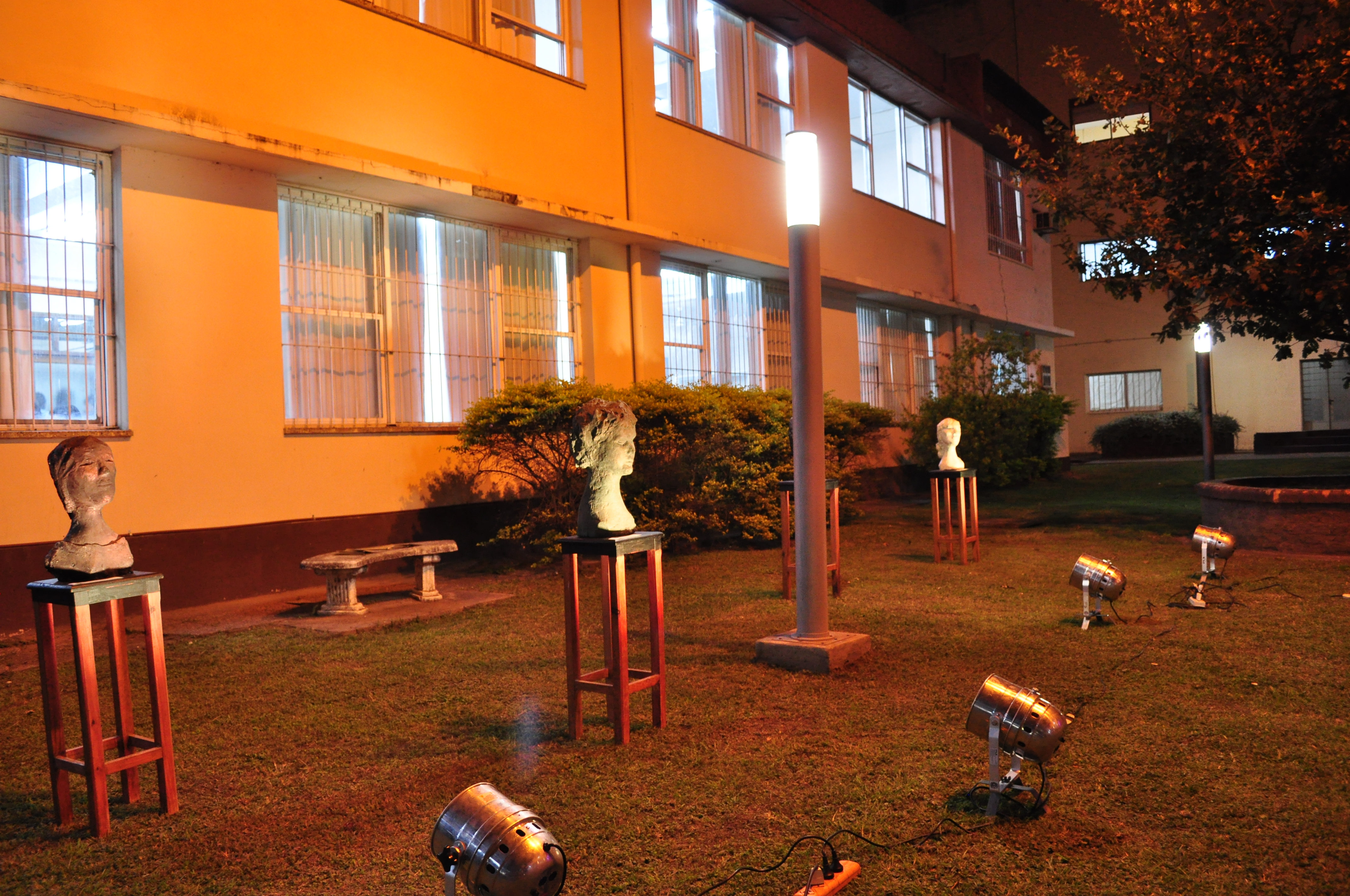 Patio del Centro Cultural "Ing. Juan Carlos Recalcatti"